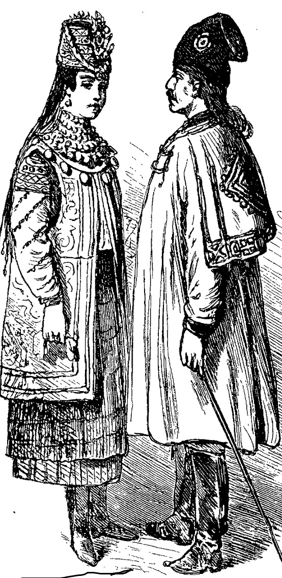 Буковинське весільне вбрання. Молода в фоті, кацавейці, карабулі з барвінковим вінком, жовтих чоботах. Молодий в білій манті, баранячій кучмі, чоботах з гострими носками.